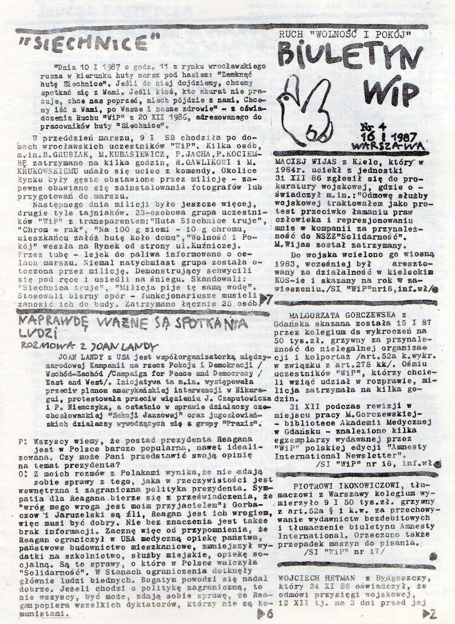 Numer 4/1987 biuletynu Ruchu Wolność i Pokój.